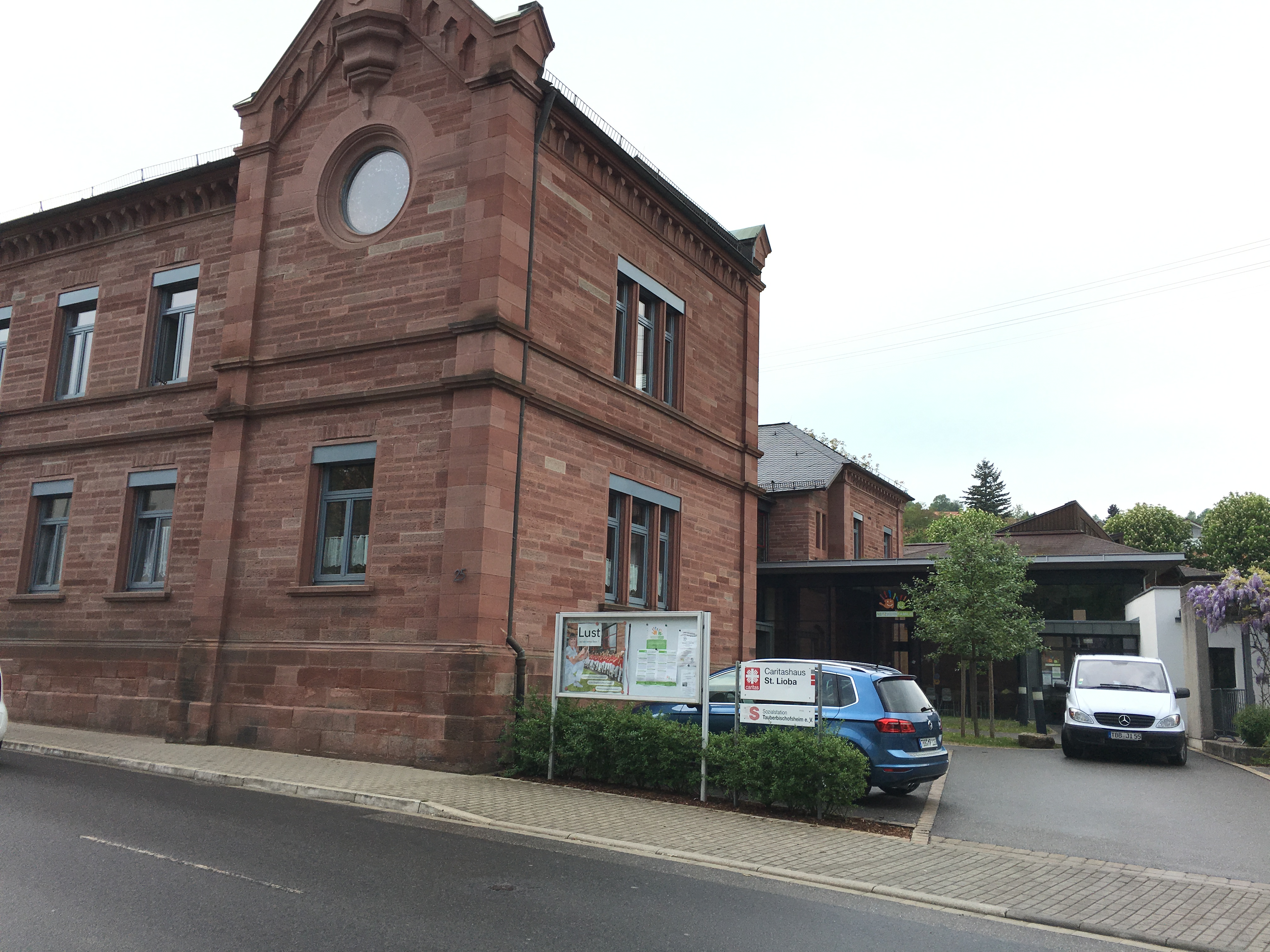 Katholische Sozialstation in Tauberbischofsheim